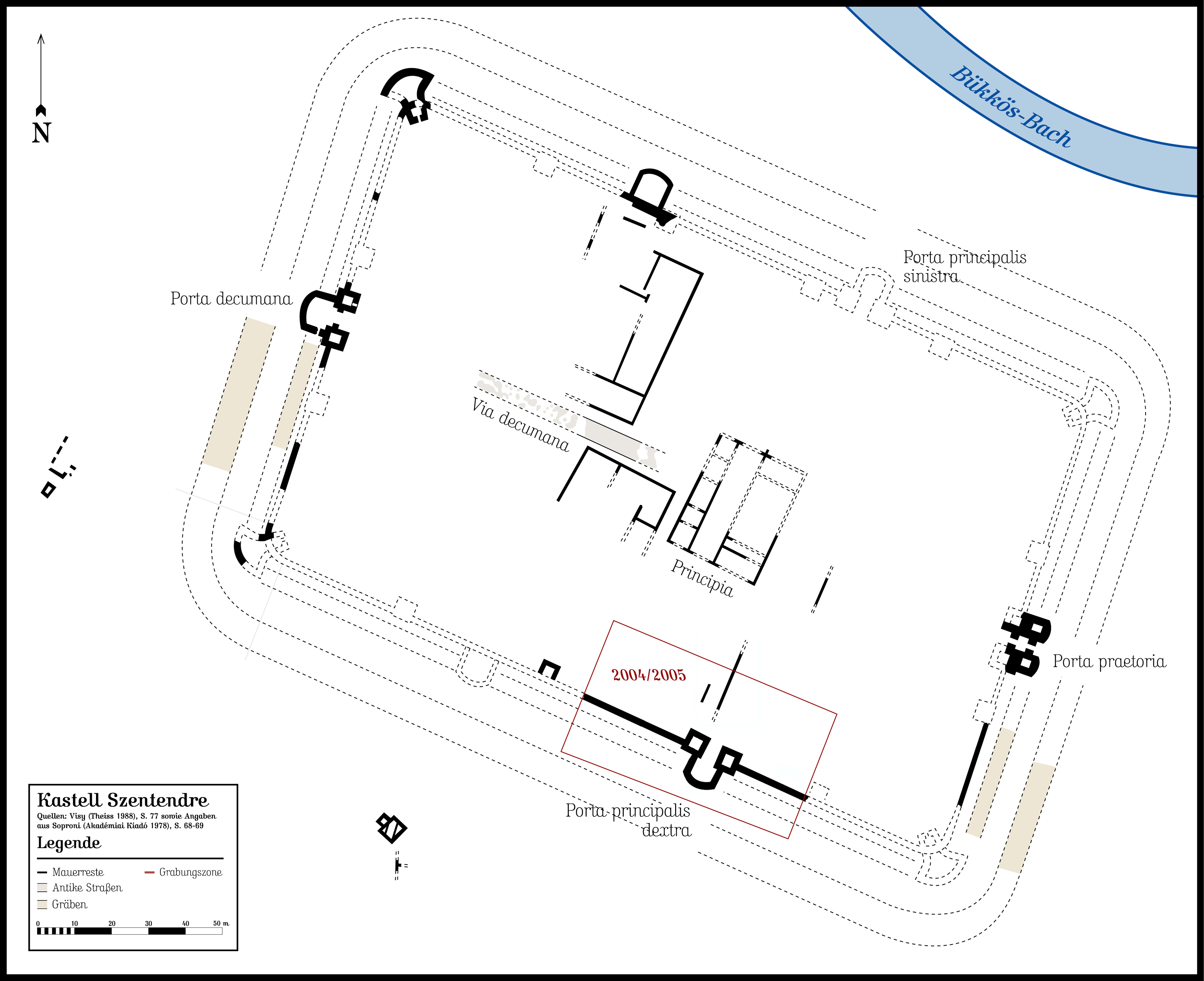 Das Kastell Szentendre am ungarischen Donaulimes. Quellen: Zsolt Visy (Theiss, Stuttgart 1988), S. 77; Sándor Soproni (Akadémiai Kiadó, Budapest 1978), S. 68–69. Die Aktualisierungen bis 2005 stammen von einem am Kastell hängenden Plan, den ich im Juni 2012 abphotographiert habe, um die neuen Grabungsergebnisse in die Zeichnung aufzunehmen. Gezeichnet in FreeHand MX für Macintosh; abgespeichert in Adobe Photoshop CS.